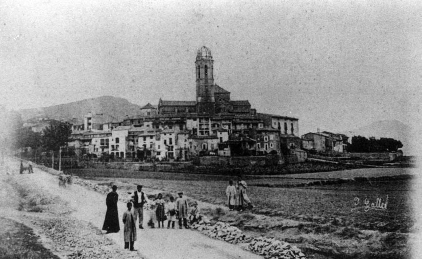 Moià, avinguda de la vila